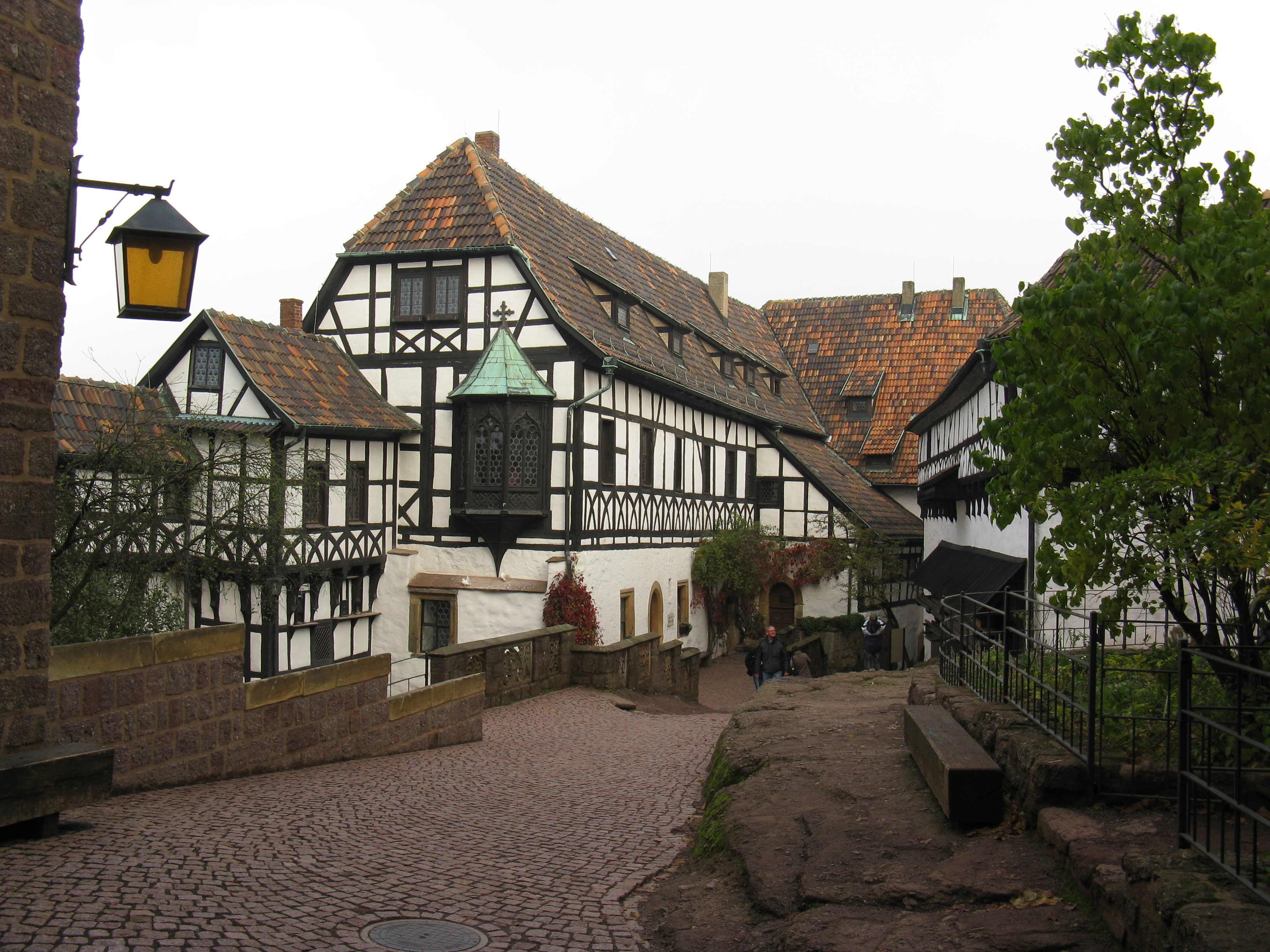 Innenhof der Wartburg